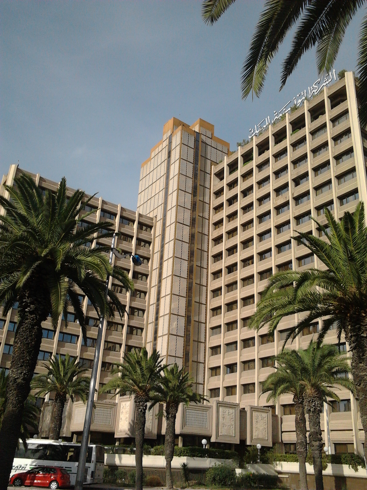 Siège social de la société tunisienne de banque STB - Avenue Mohamed V - Tunis.